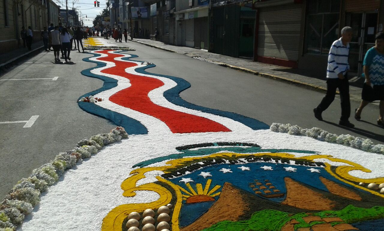 Pasada de la Negrita en Cartago, 6 septiembre de 2014. Costa Rica.